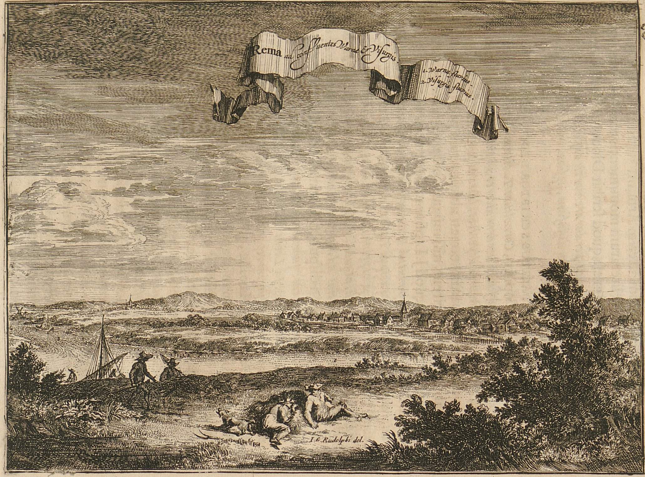 Rehme und Zusammenfluss von Werre und Weser